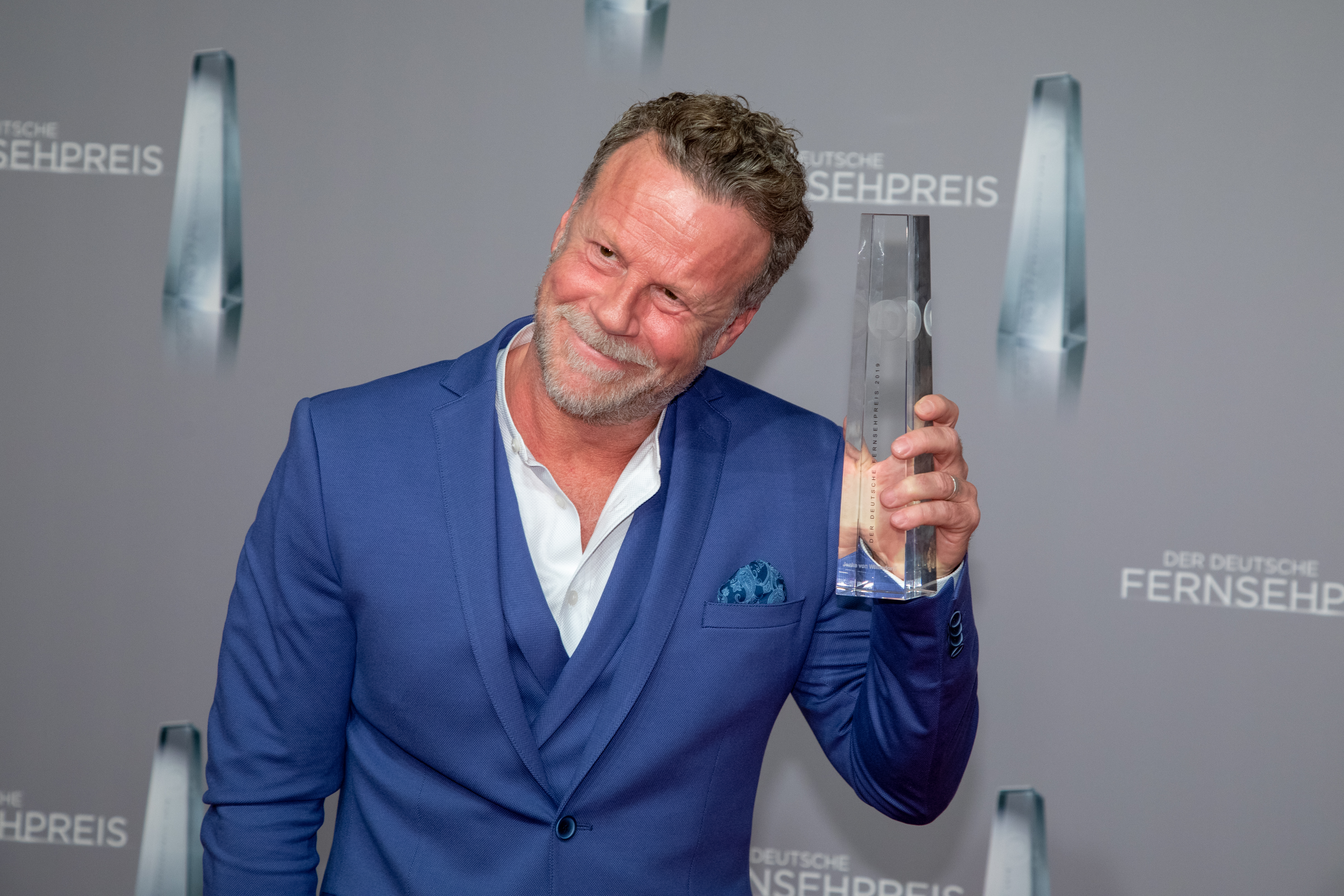 Jenke von Wilmsdorff beim Deutschen Fernsehpreis 2019 in der Düsseldorfer Rheinterrasse